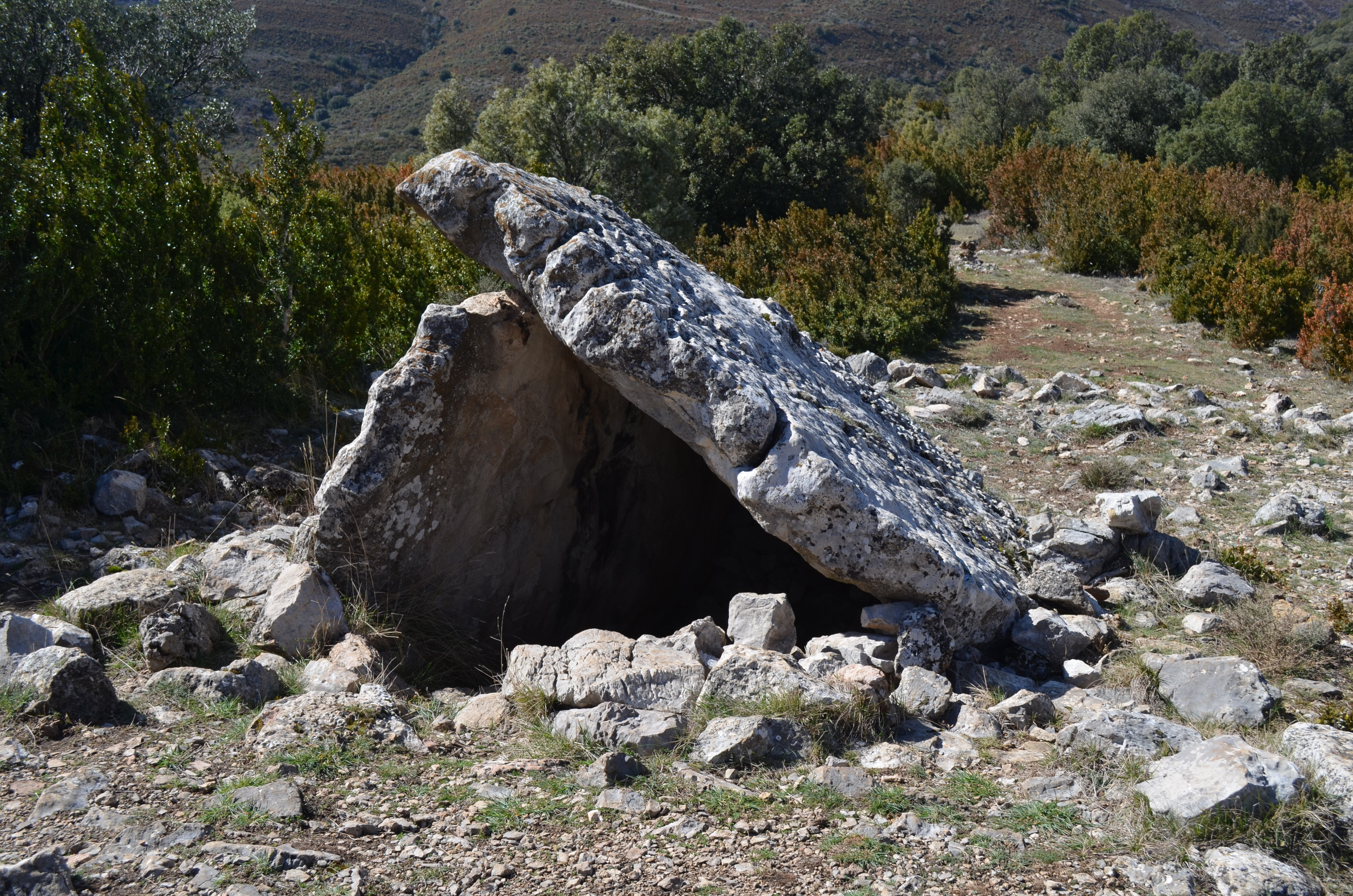 Dolmen de la Piatra (también llamado del Gargantal, de Belsué, de Ibirque), junto a Belsué, en la Sierra de Guara (Huesca). Vista desde el sureste.